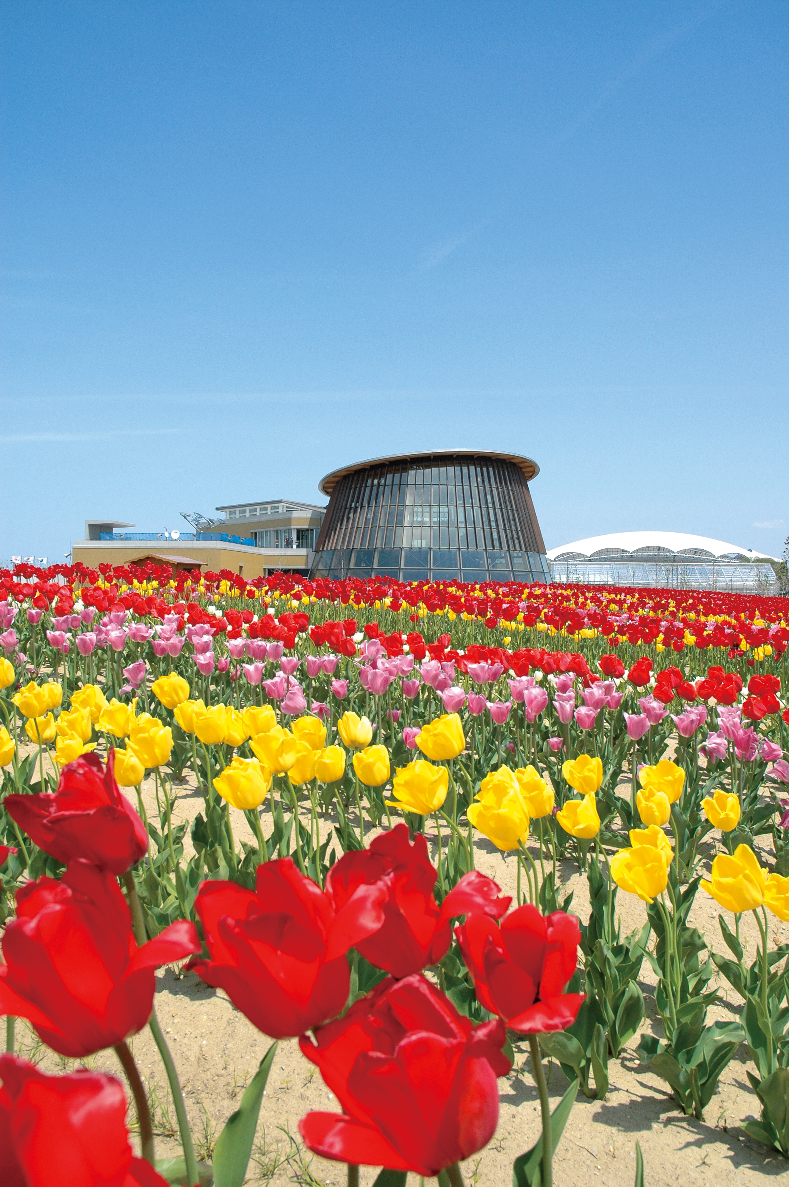 食育・花育センター 新潟市中央区 2012年撮影